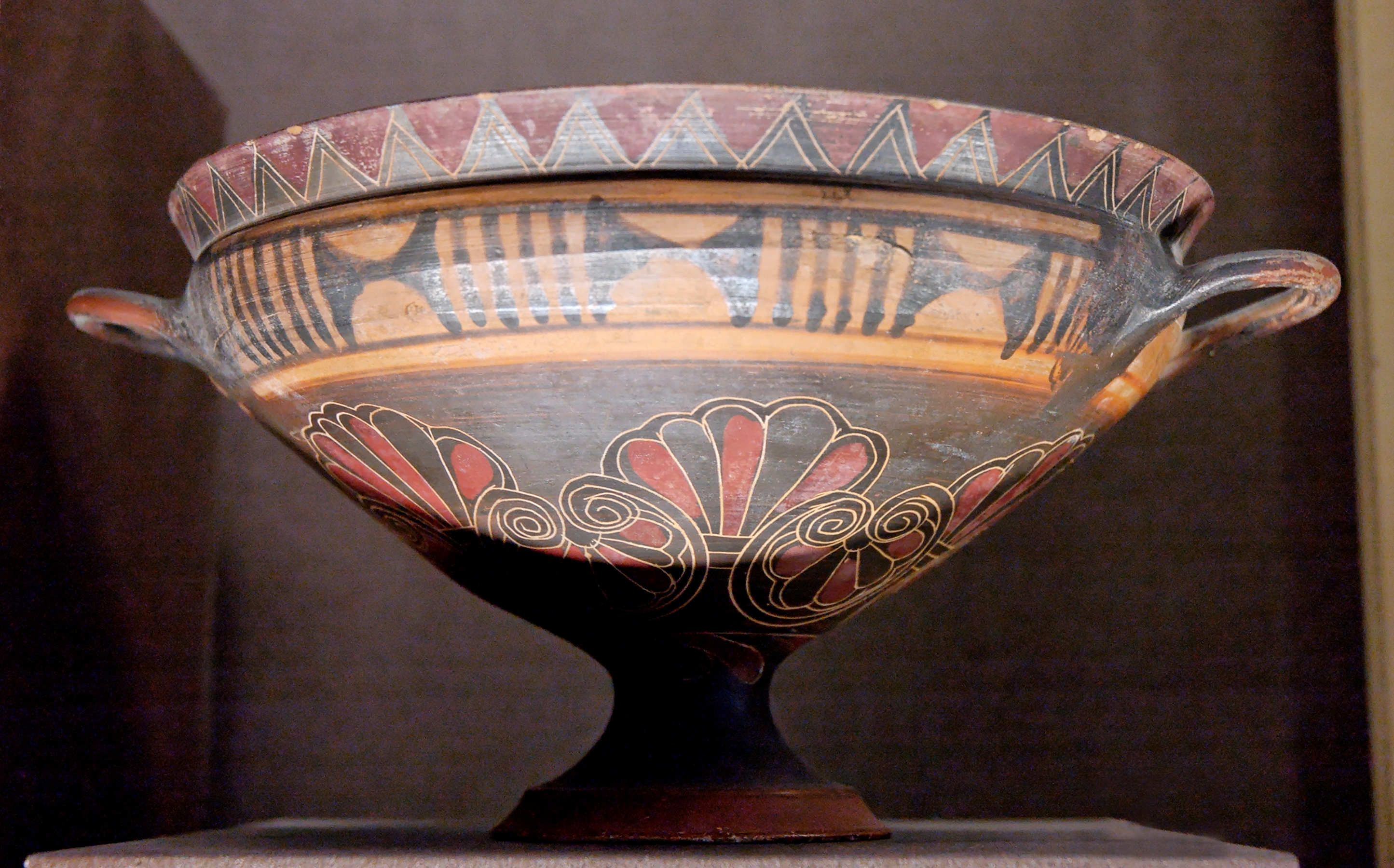 Vroulia cup, ca. 600–575 BC. Found in Kameiros, Rhodes.